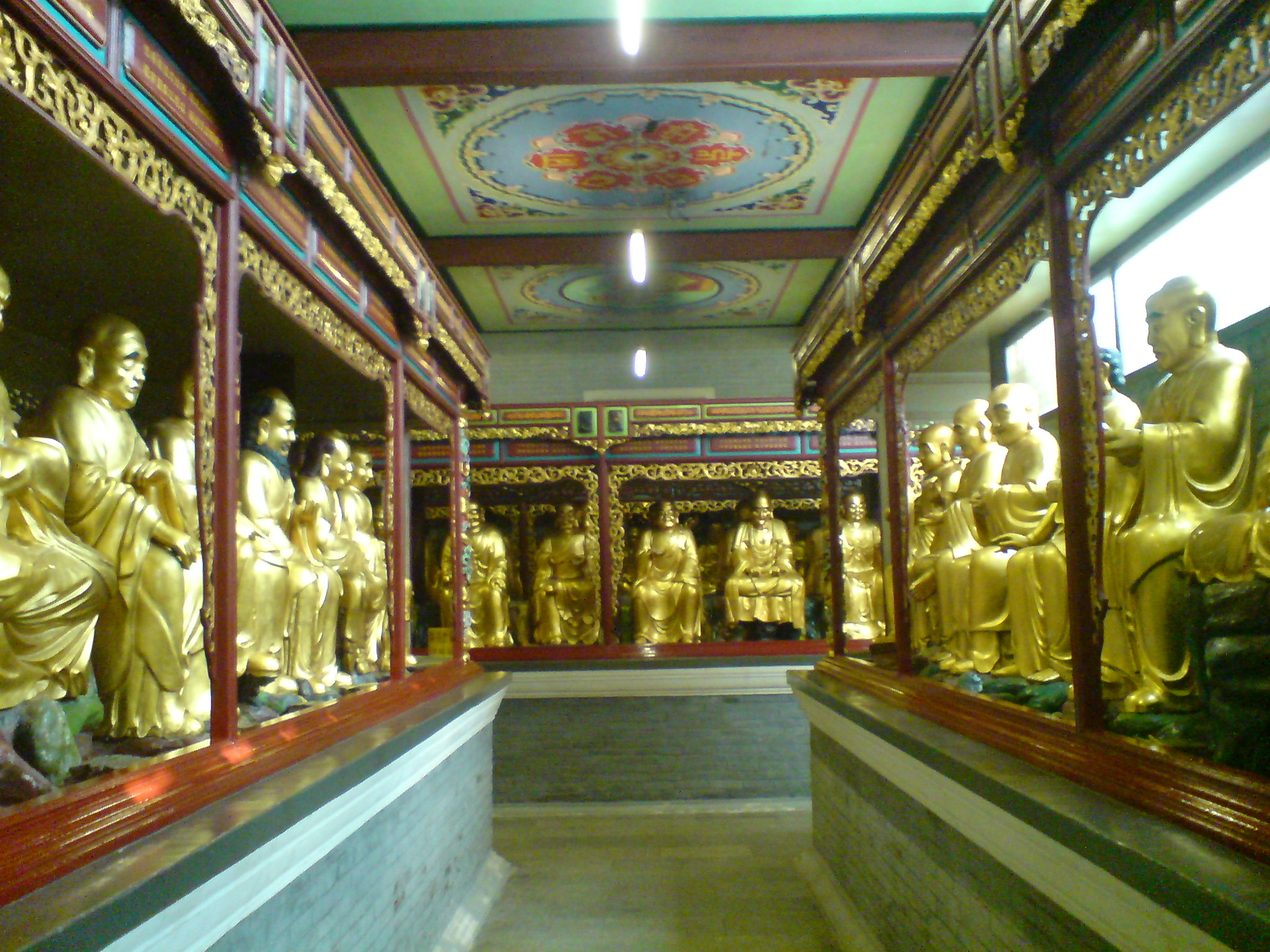 广州华林寺五百罗汉堂内